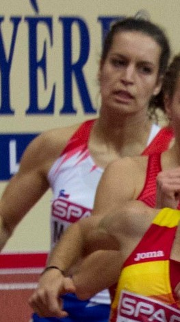 135 800m halve finale henriksdottir